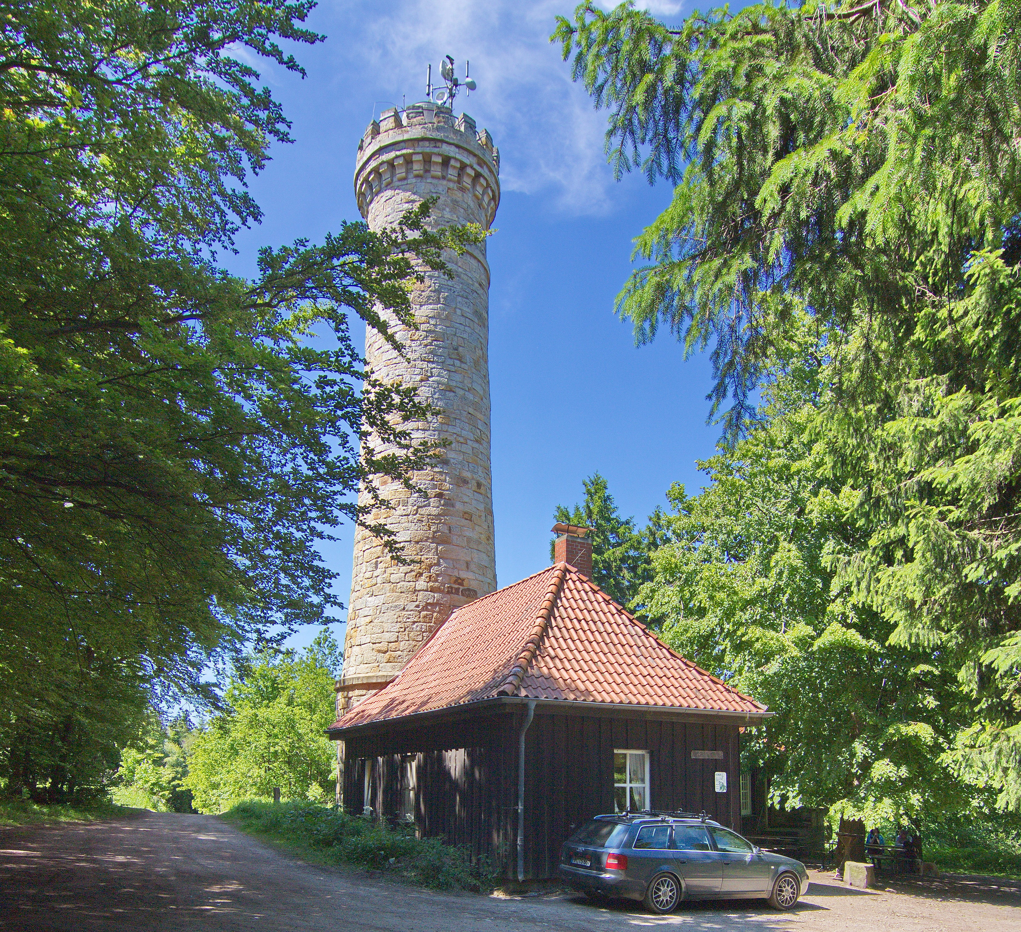 Süntelturm von 1901 auf der Hohen Egge im Landschaftsschutzgebiet Süntel, Niedersachsen, Deutschland